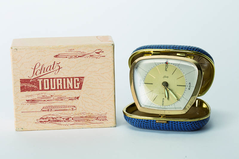 Reisewecker, Etuiwecker, Jahresuhrenfabrik Schatz, Triberg, um 1956, Deutsches Uhrenmuseum, Inv. 1995-982